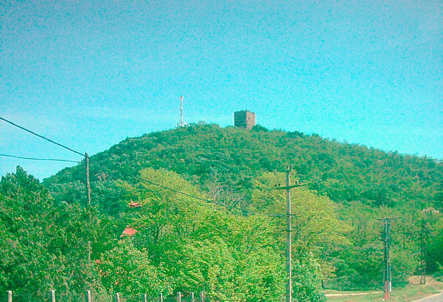 Vršac Tower